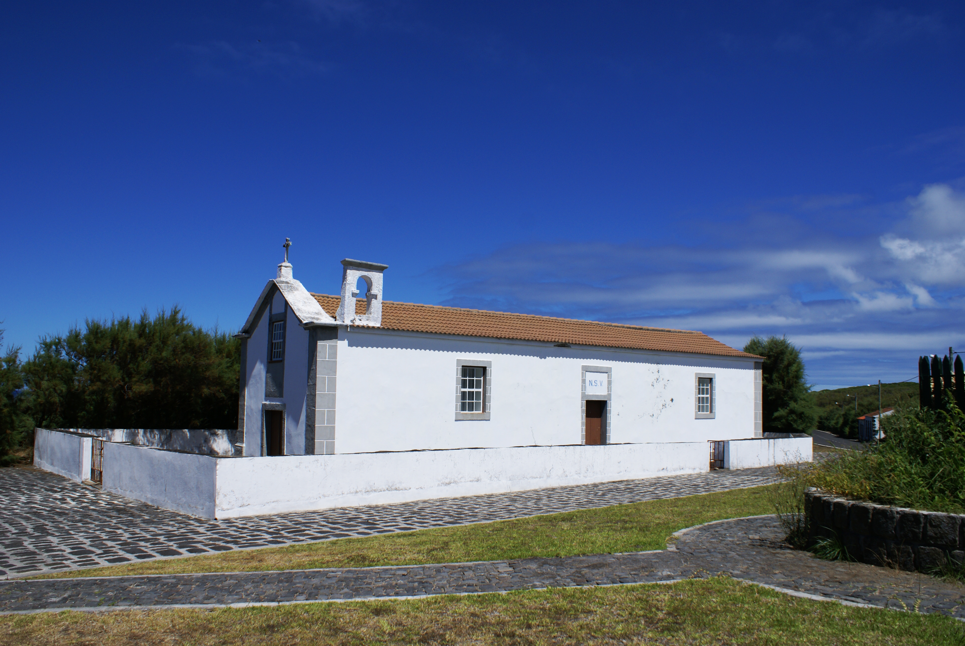 Ermida de Nossa Senhora das Vitórias, vista lateral, Vitória, Santa Cruz da Graciosa, ilha Graciosa, Açores, Portugal